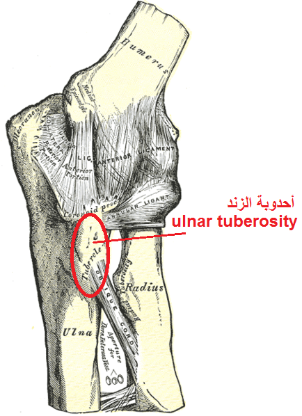 مفصل المرفق الأيسر ، أحدوبة الزند Left elbow joint, showing ulnar tuberosity